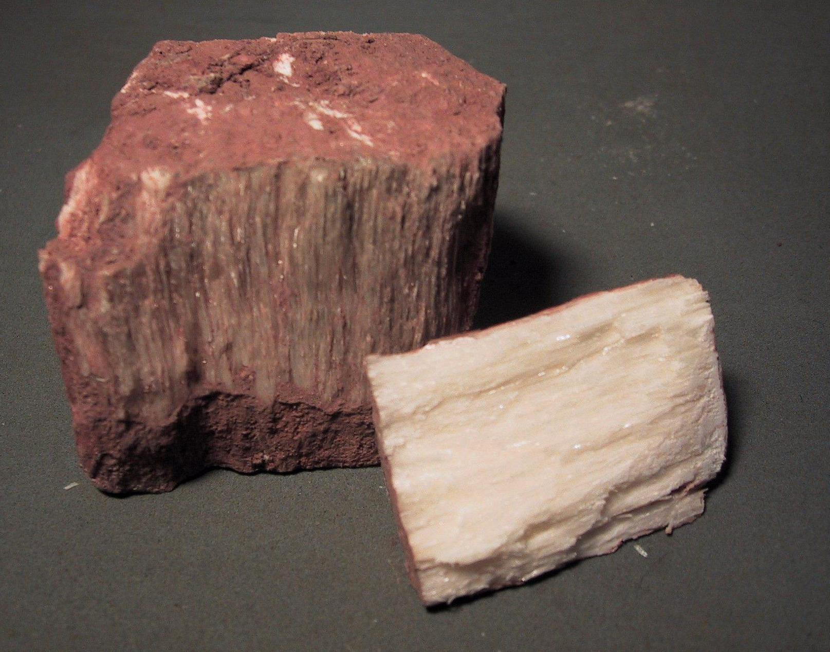 Fasergips